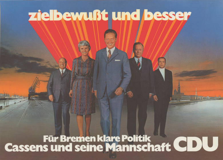 zielbewußt und besser Für Bemen klare Politik Cassens und seine Mannschaft CDU Abbildung: Gruppenfoto vor typischem Bremer Hafen- und Stadthintergrung (Fotomontage) Kommentar: Vgl. sog. "Django"-Plakat der hessischen CDU Plakat Nr. 10-007-301 und aus Schleswig-Holstein Plakat Nr. 10012-301. Plakatart: Kandidaten-/Personenplakat mit Porträt Objekt-Signatur: 10-005 : 350 Bestand: Plakate zu Bürgerschaftswahlen Bremen (10-005) GliederungBestand10-18: Plakate zu Bürgerschaftswahlen Bremen (10-005) » CDU Lizenz: KAS/ACDP 10-005 : 350 CC-BY-SA 3.0 DE